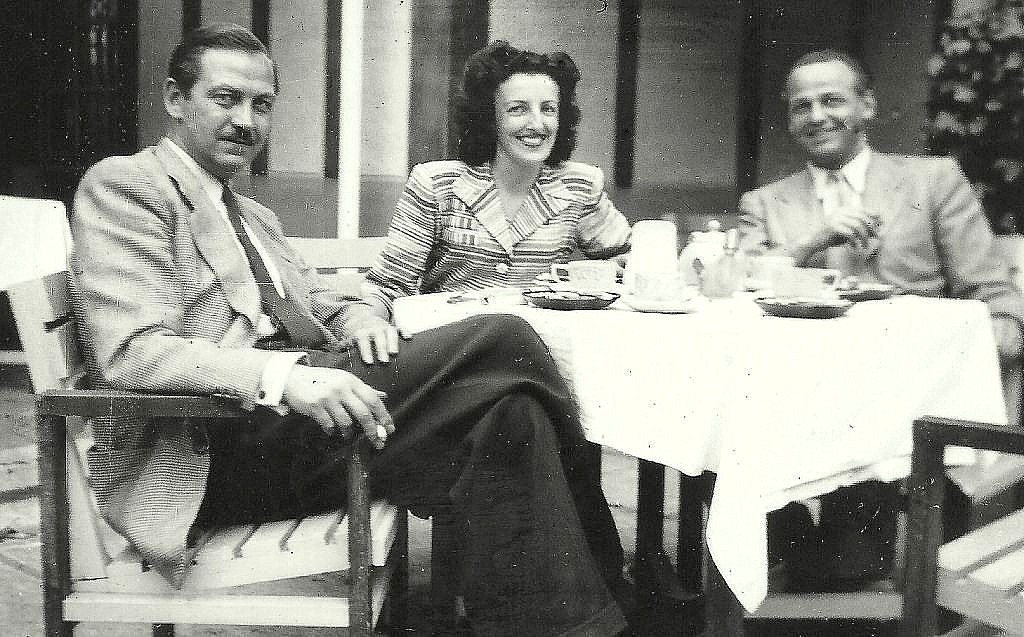 Le scénariste et dialoguiste Gérard Carlier (à gauche) et le compositeur Joe Hajos (à droite) en 1946. Au mileu, Irène Élisabeth Reinert.